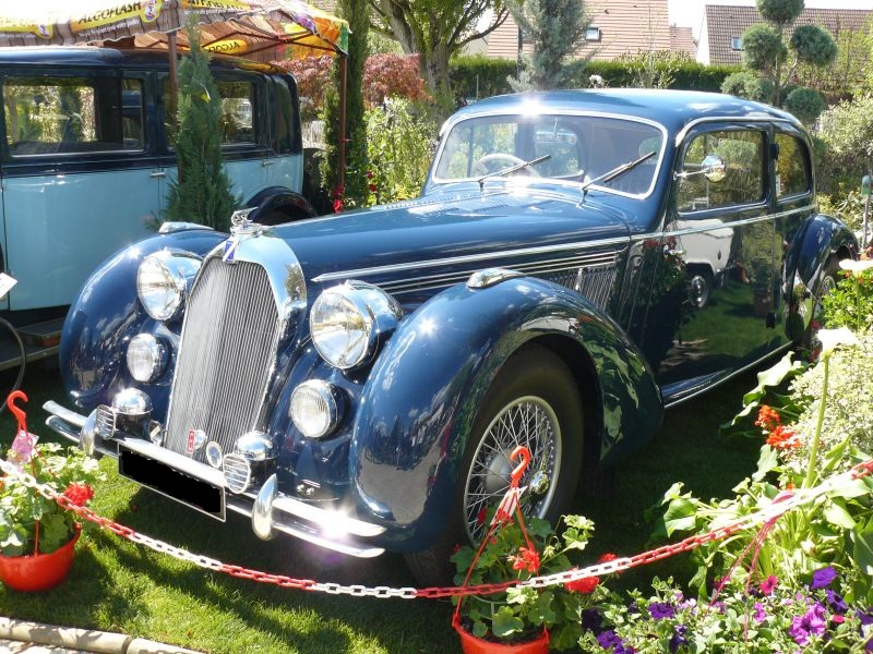 Photo prise à Chelles le 1er Mai 2012.